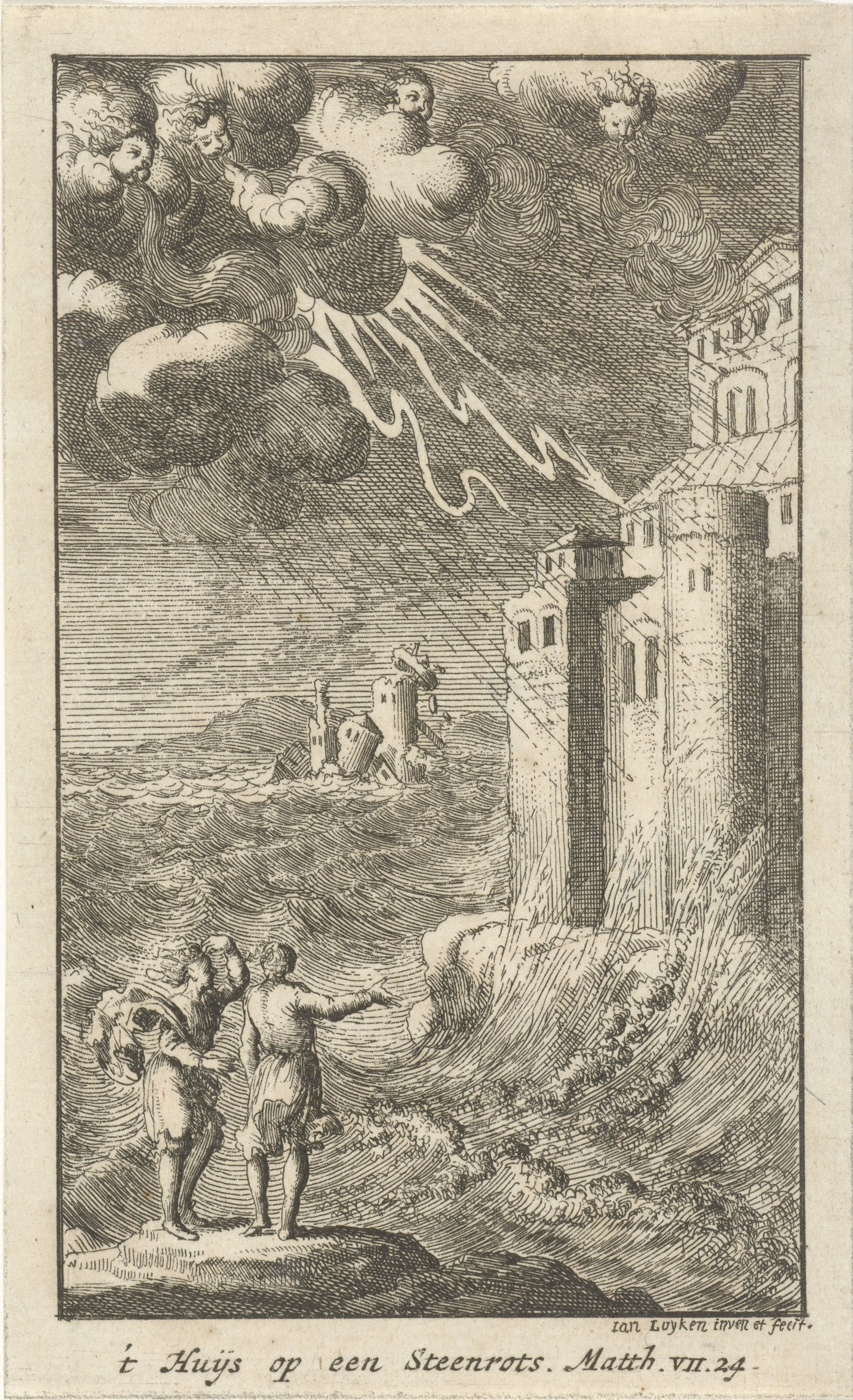 IdentificatieTitel(s): Het huis op de rots't Huijs op een SteenrotsVierentwintig scènes uit het Nieuwe Testament (serietitel)Objecttype: prent boekillustratie Objectnummer: RP-P-1896-A-19368-147Catalogusreferentie: Van Eeghen 156Opschriften / Merken: verzamelaarsmerk, verso, gestempeld: Lugt 2228VervaardigingVervaardiger: prentmaker: Jan Luyken (vermeld op object)naar eigen ontwerp van: Jan Luyken (vermeld op object)Plaats vervaardiging: AmsterdamDatering: 1681Fysieke kenmerken: etsMateriaal: papier Techniek: etsenAfmetingen: blad: h 124 mm × b 76 mmToelichtingTwintig prenten van deze serie (Waar: onder de hier besproken prent) verschenen mogelijk voor het eerst in: Het Nieuwe Testament ofte alle Boecken des Nieuwen Verbondts onses Heeren Iesu Christi. Amsterdam: Hieronymus Sweerts, Jan ten Hoorn, Jan Bouman en Daniel van den Dalen, 1681. De complete vierentwintigdelige serie prenten is opgenomen in: Het Nieuwe Testament ofte alle Boecken des Nieuwen Verbondts onses Heeren Iesu Christi. Dordrecht: Pieter en Jacob Keur, 172X (niet voor 1727). De prenten werden, hetzij alle tezamen, hetzij gedeeltelijk, veel gebruikt tot versiering van Nieuwe Testamenten en verschenen tevens in kopie.OnderwerpWat: house built upon a rock; house built upon sand ~ doctrine of Christ on love, etc. (Matthew 7:24-27; Luke 6:47-49)Verwerving en rechtenVerwerving: aankoop jul-1896Copyright: Publiek domein